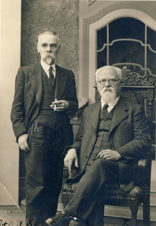 Jonas Šliūpas (sitting) and Andrius Graičiūnas in Chicago